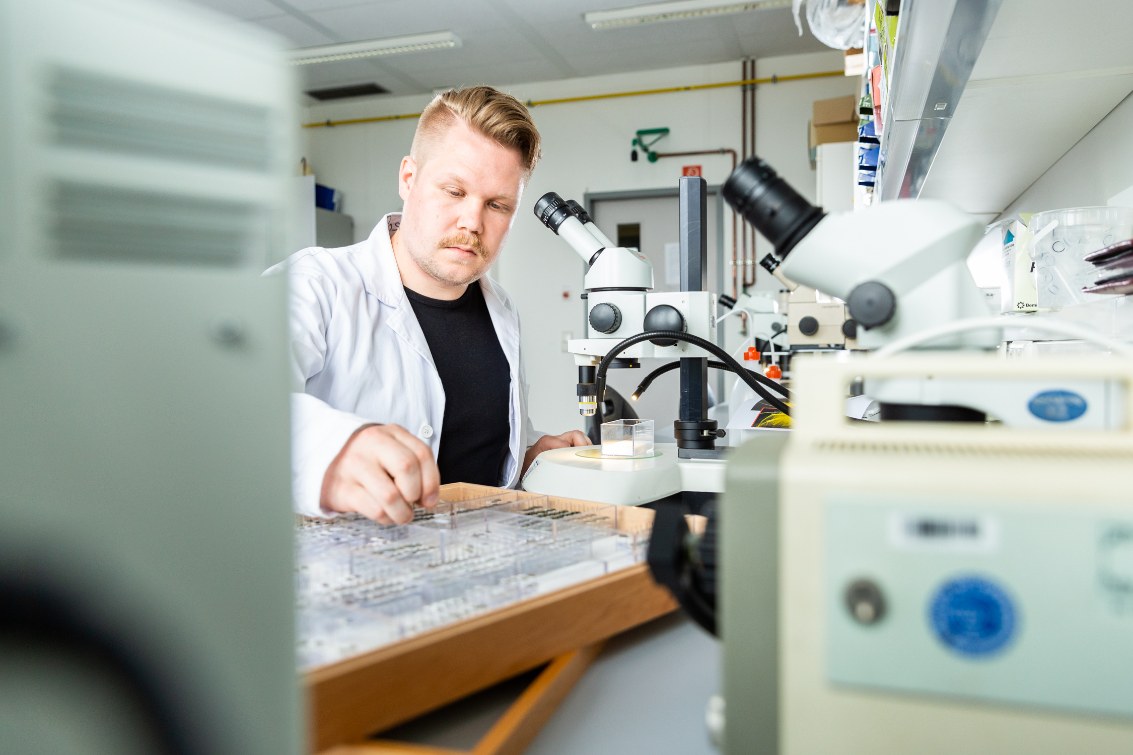 Insektenforscher Thomas Hörren bei der Arbeit am Mikroskop.